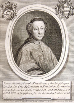 Cardeal Pedro Luís Carafa